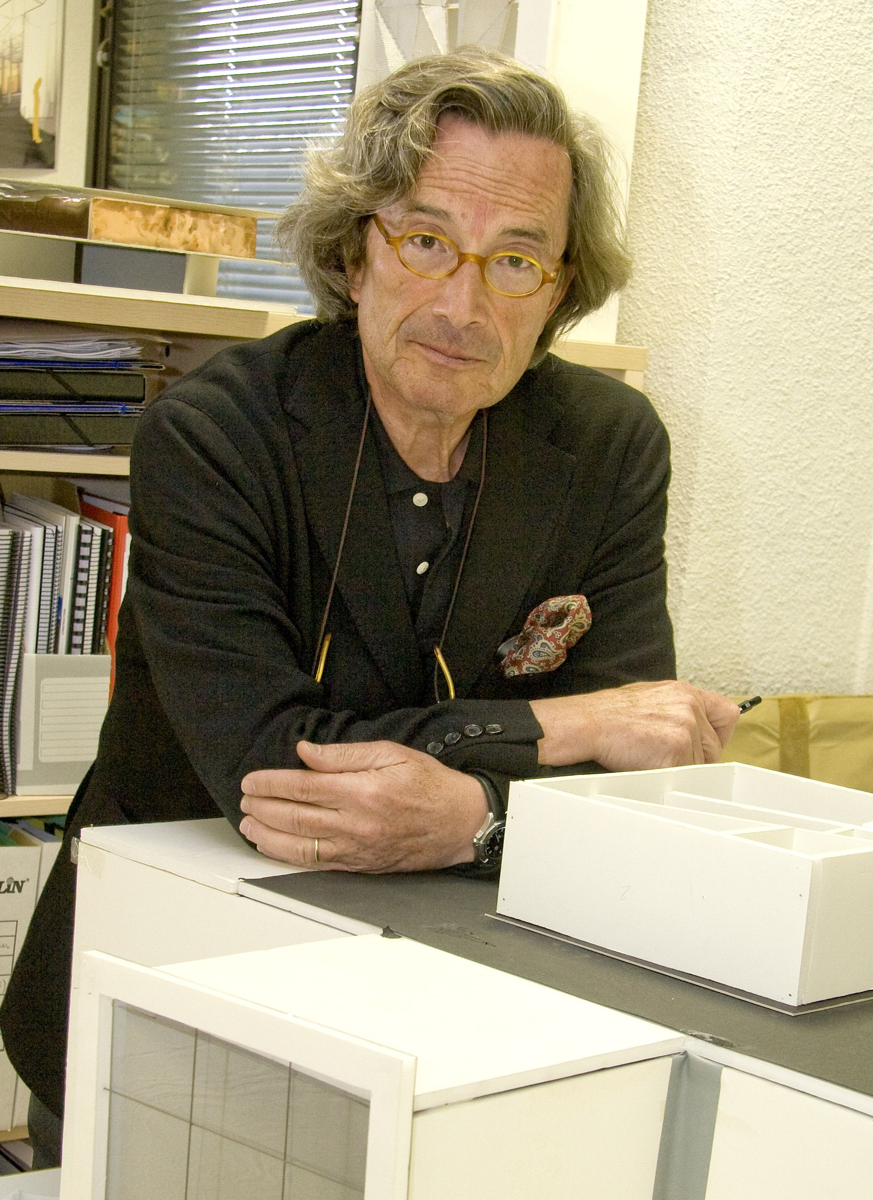 Trabajando en el Estudio